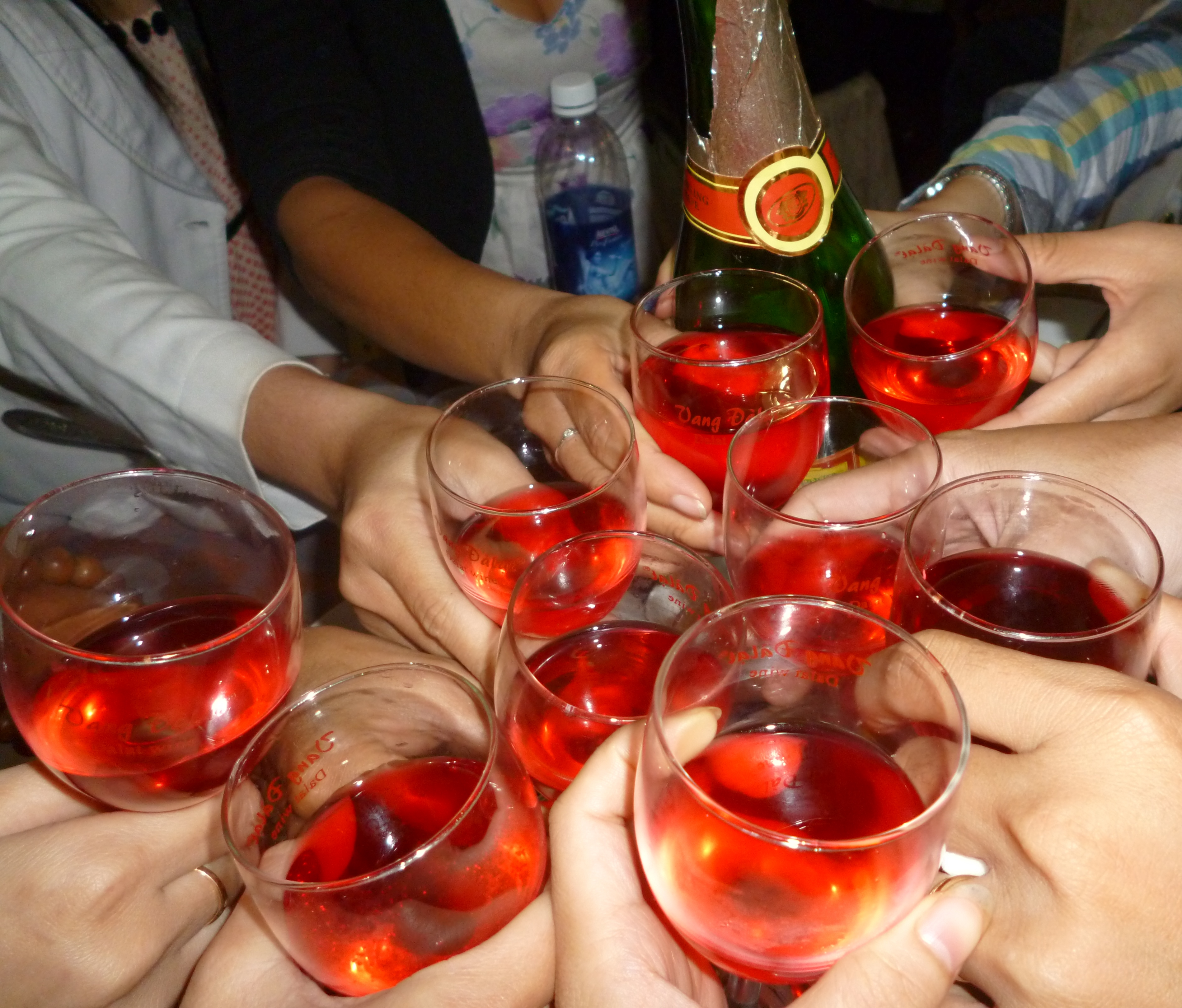 Cuisine of Vietnam